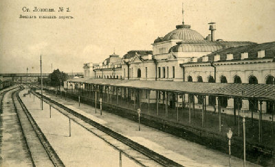 Вокзал станции Лозовая Южных железных дорог. Открытка начала ХХ века